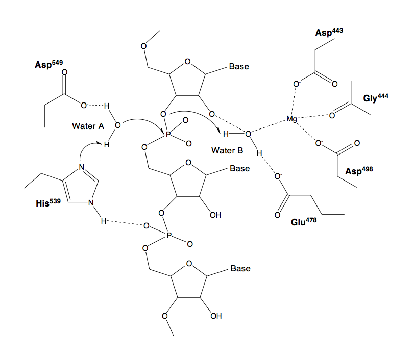 HIV-1 RNase H Mechanism